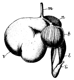 Die kompartemente van 'n herkouer se maag (m. slukderm, v. grootpens, n. ruitjiespens, b. blaarpens, l. melkpens, i. twaalfvingerige derm).